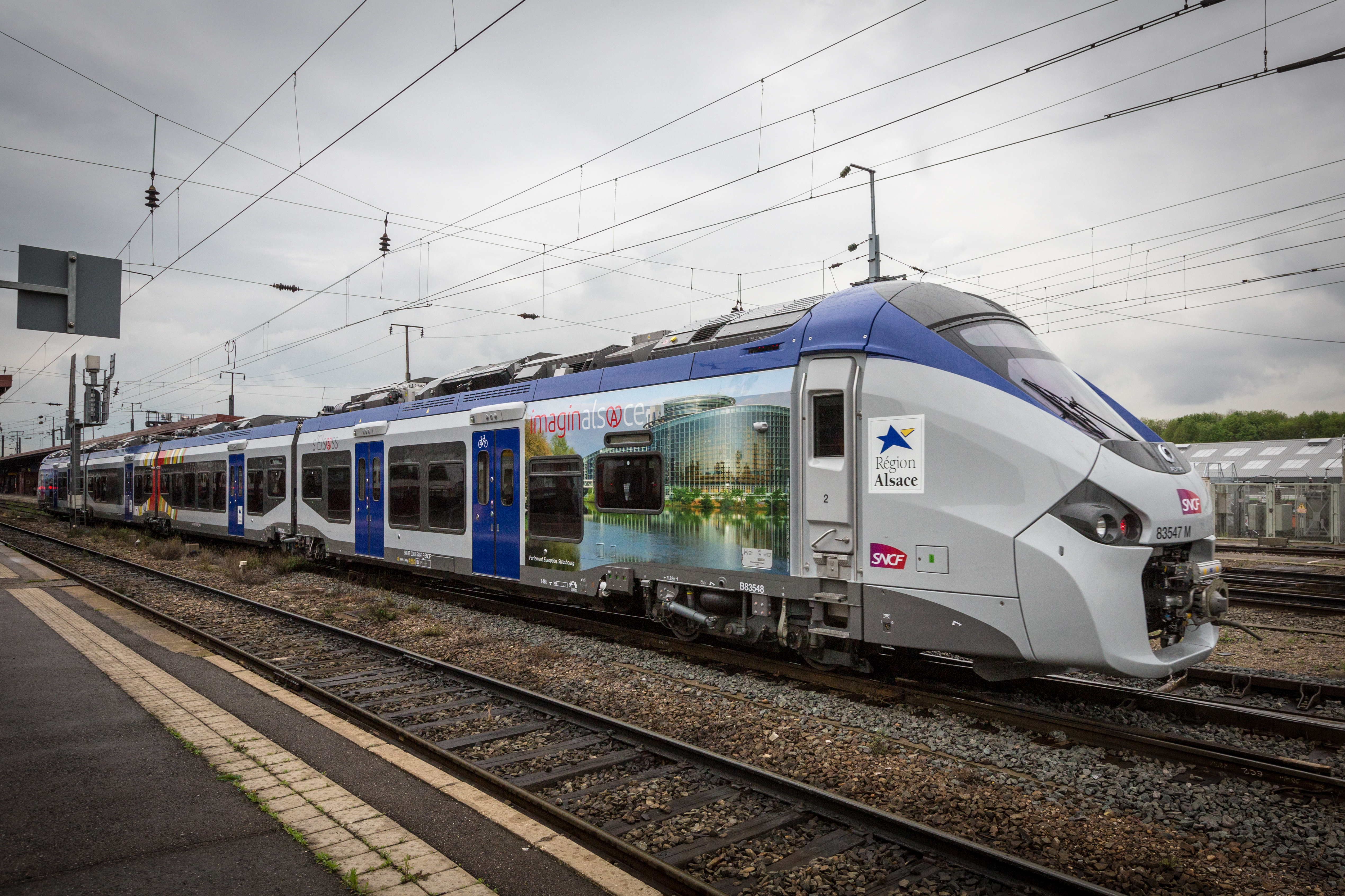 Le premier train Régiolis SNCF Région Alsace B83547M en service commercial dans la région Alsace, TER 830910 Strasbourg-Sarreguemines 28 avril 2014.